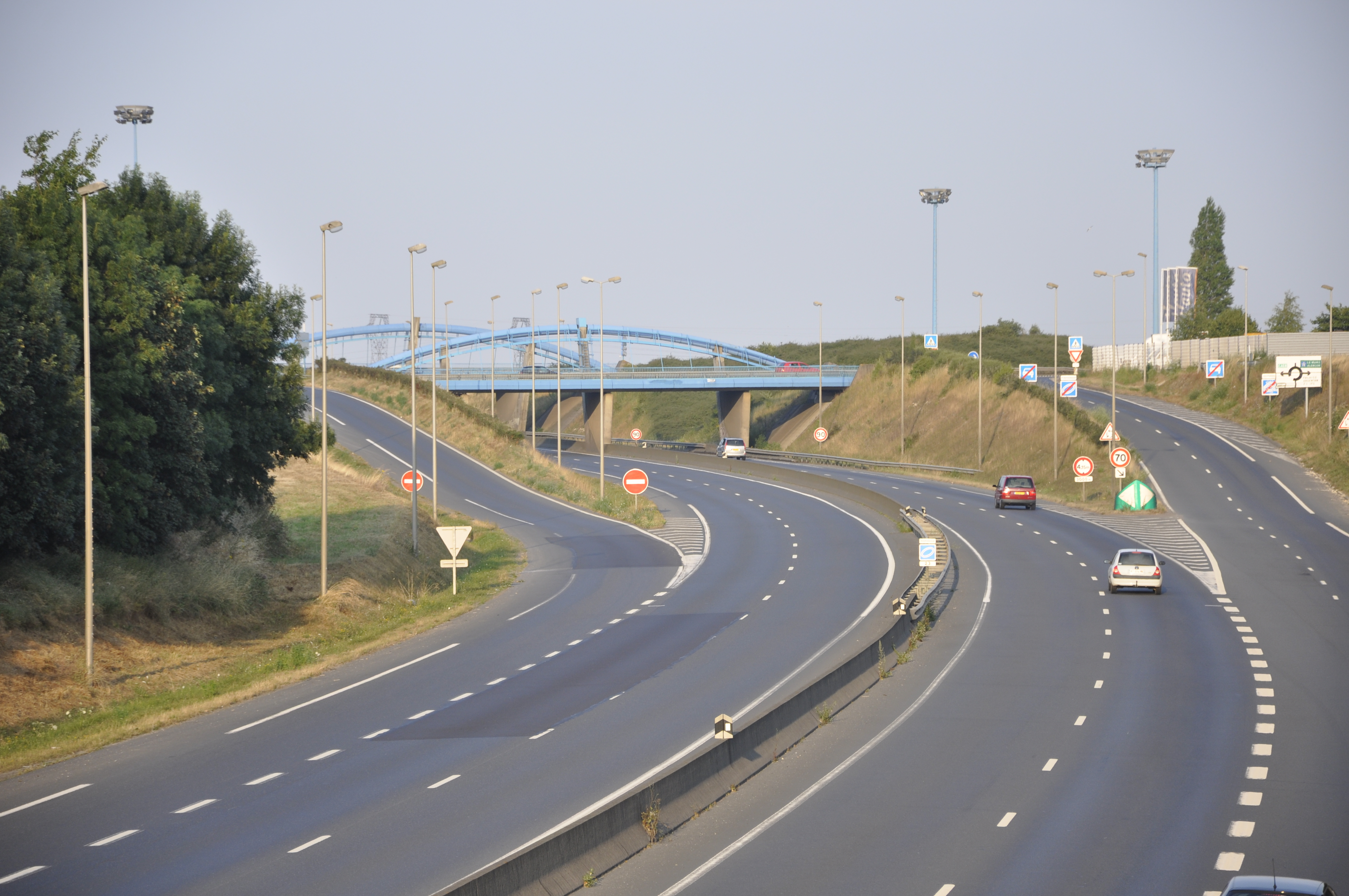 rond point "bleu" d'Ifs sur le boulevard périphérique